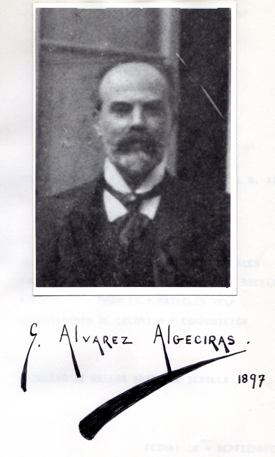 Germán Álvarez Algeciras